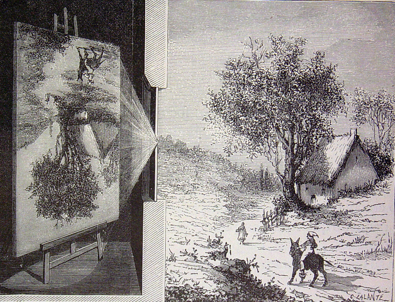 Ilustraciones pertenecientes al libro : El mundo físico : gravedad, gravitación, luz, calor, electricidad, magnetismo, etc. / A. Guillemin. - Barcelona Montaner y Simón, 1882